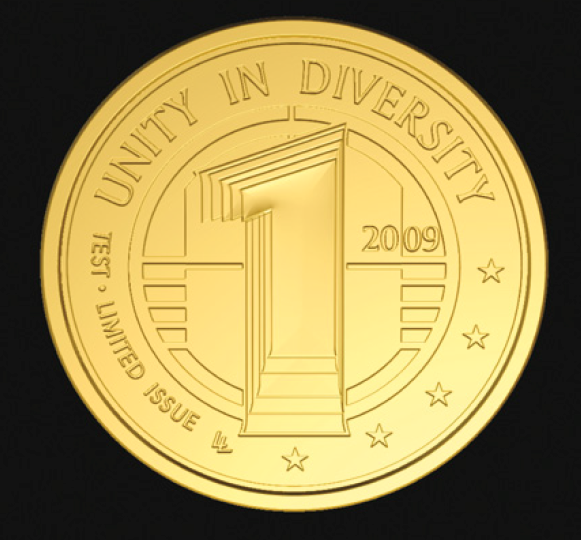 Il lato dritto della moneta globale del futuro. Il numero 1 è ripetuto cinque volte, a simboleggiare i cinque continenti. La parte artistica è stata affidata a Luc Luycx, coin designer del lato comune di tutte le monete Euro, e a Laura Cretara, che come responsabile artistica della Zecca ha creato la moneta da 1€ italiana, e le famose 500 Lire bimetalliche.